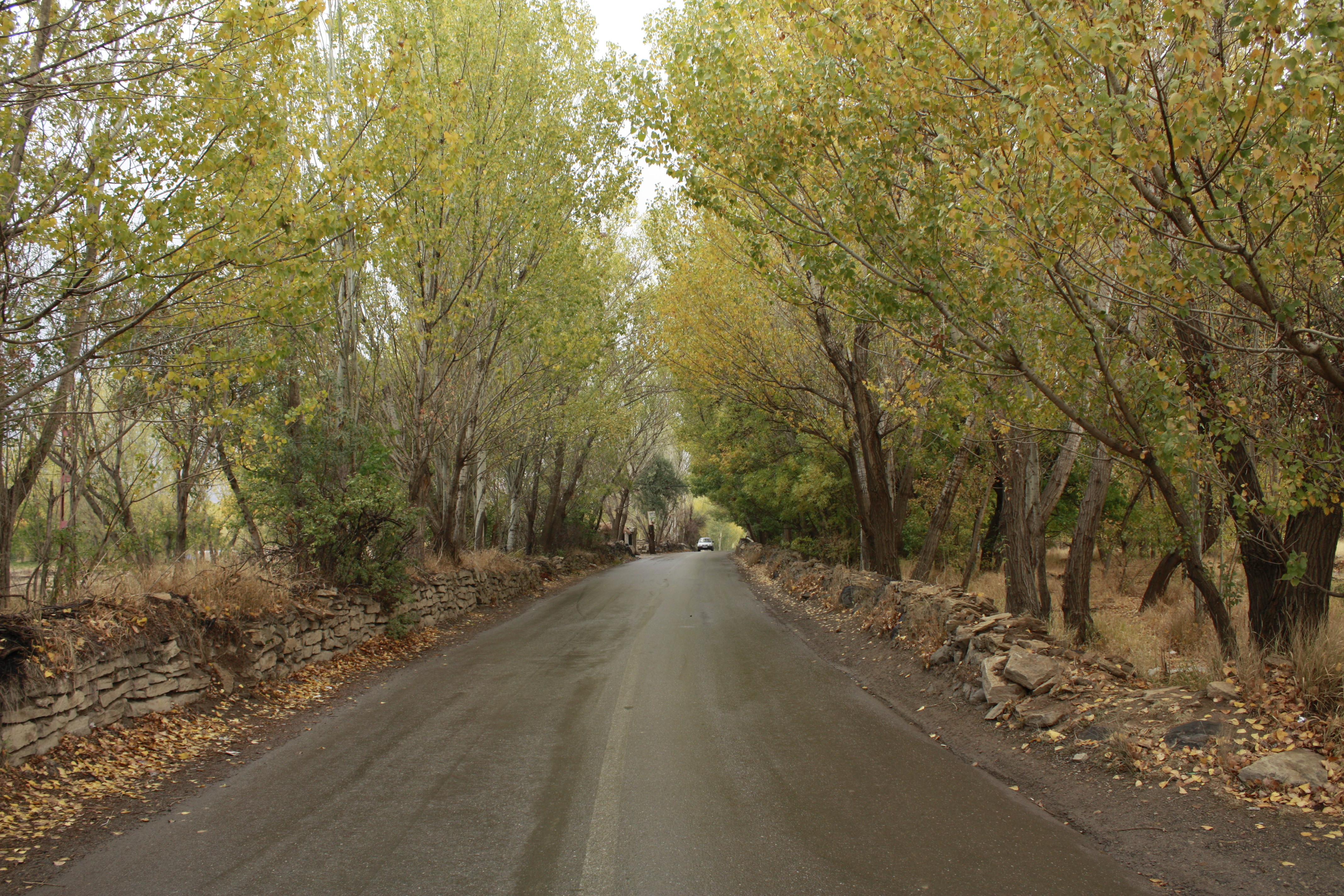 همدان